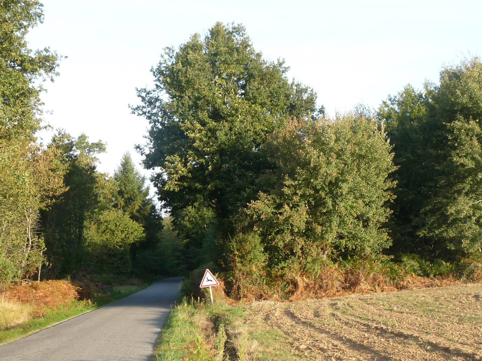 forêt de Quatre Vaux, Charente, France; vue depuis les Frauds, Taponnat